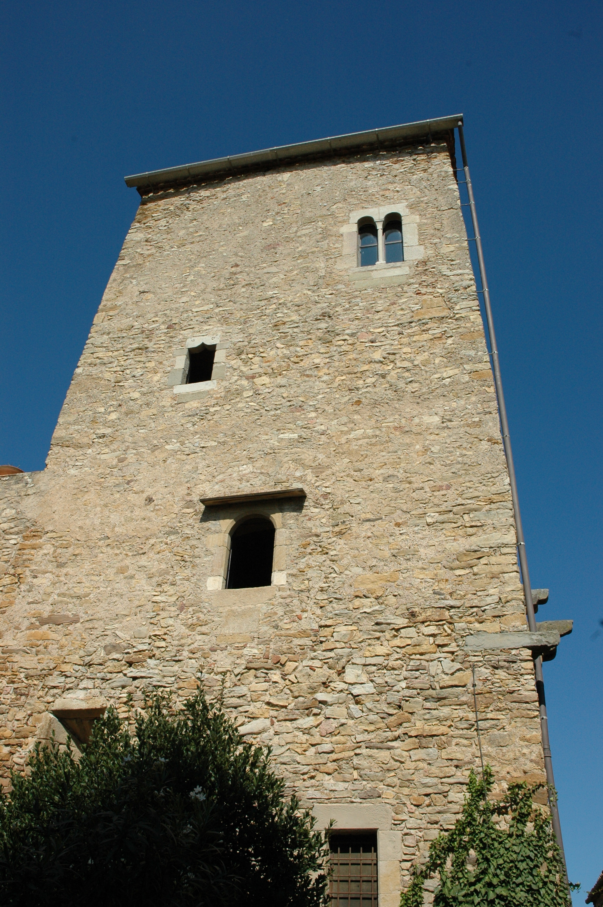 Castell de Palau-sator